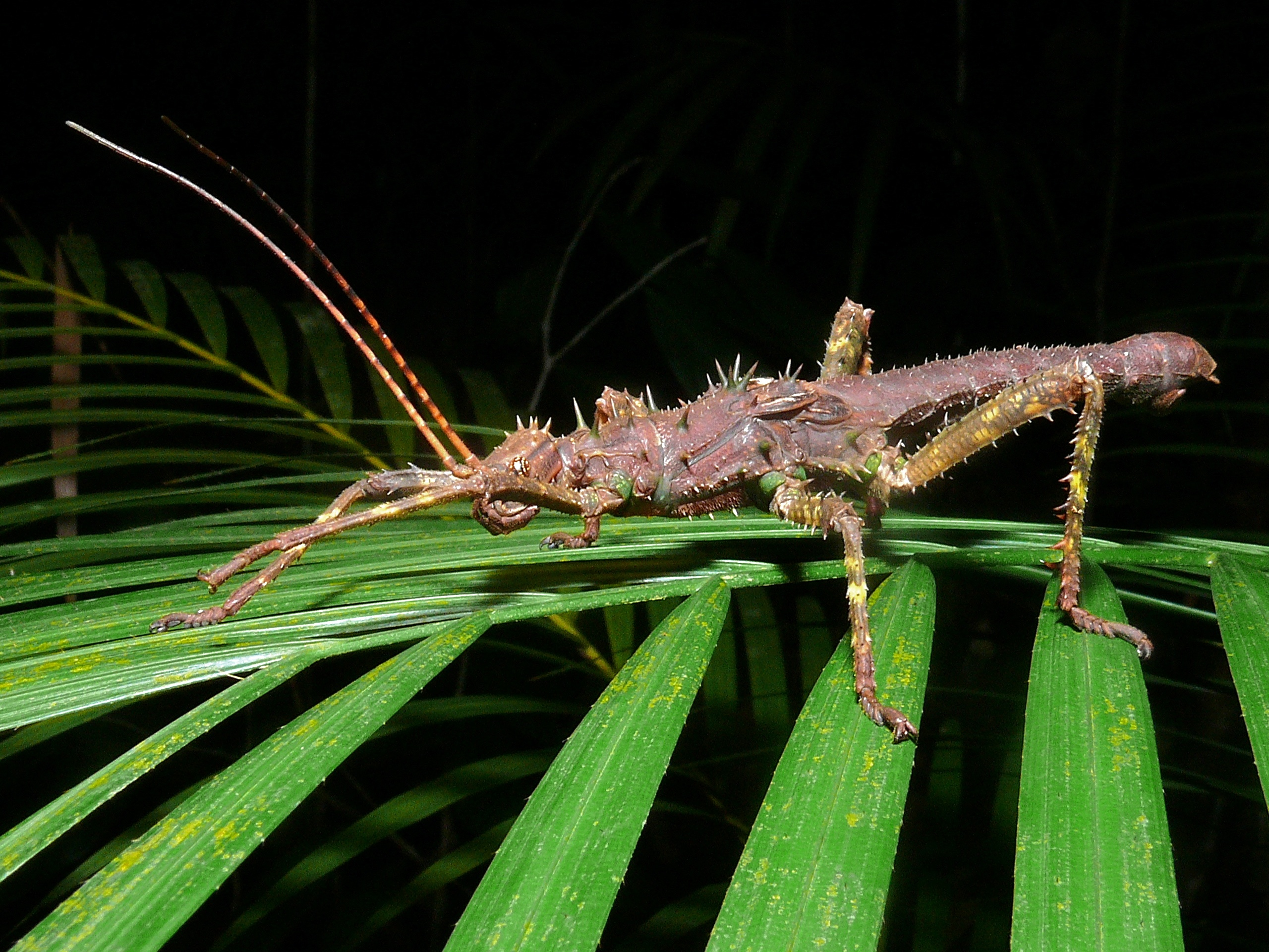 Similajau NP, Sarawak, MALAYSIA